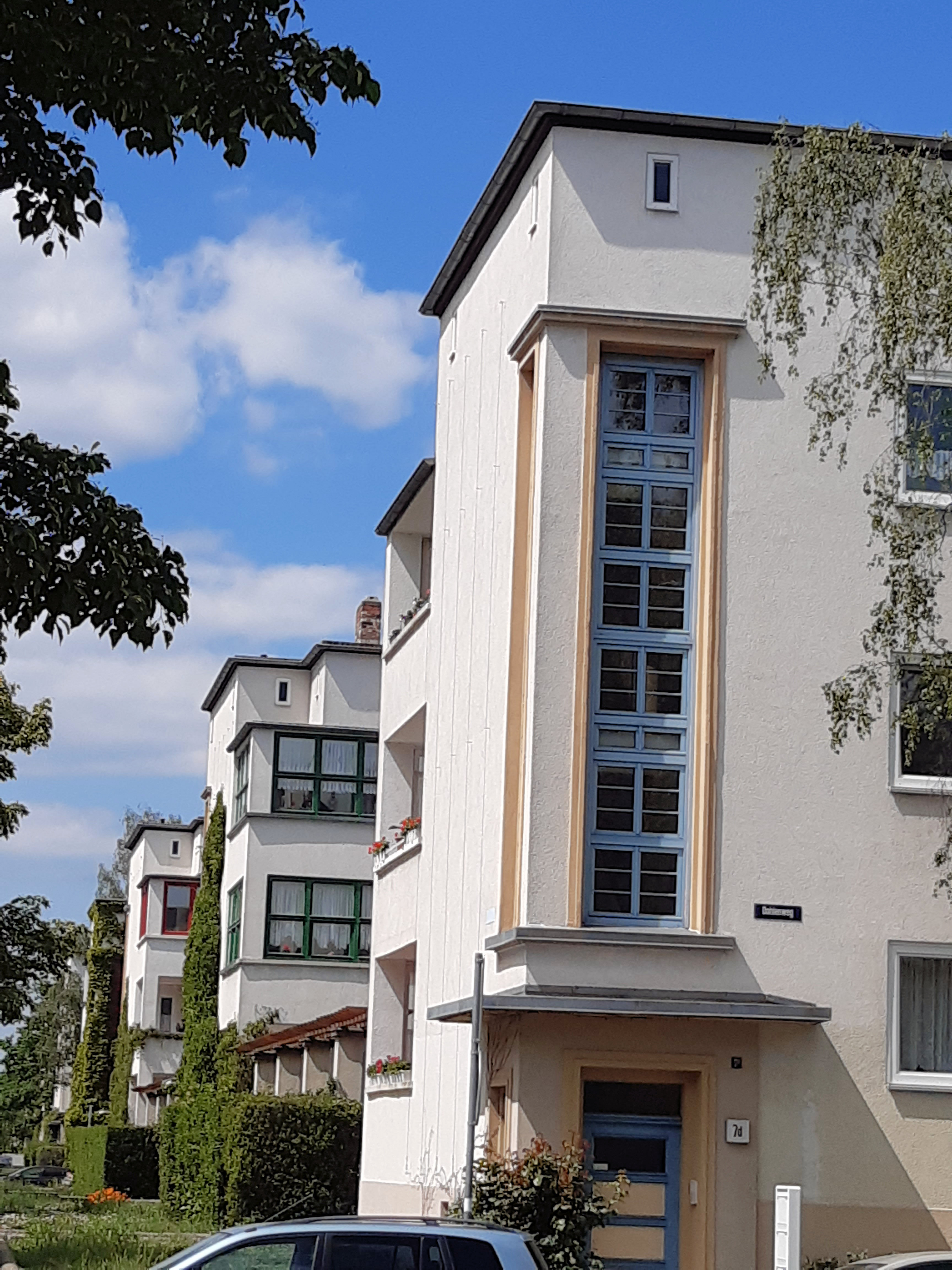 Siedlung Vogelweide, Ecke Vogelweide/Dohlenweg, Halle (Saale), erbaut 1930/31, Architekt Heinrich Faller